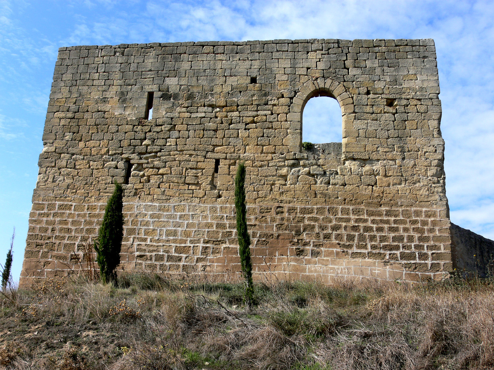 Torre Mocha en Foncea, La Rioja - España.